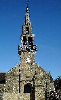 Eglise du drennec